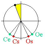 name tells all